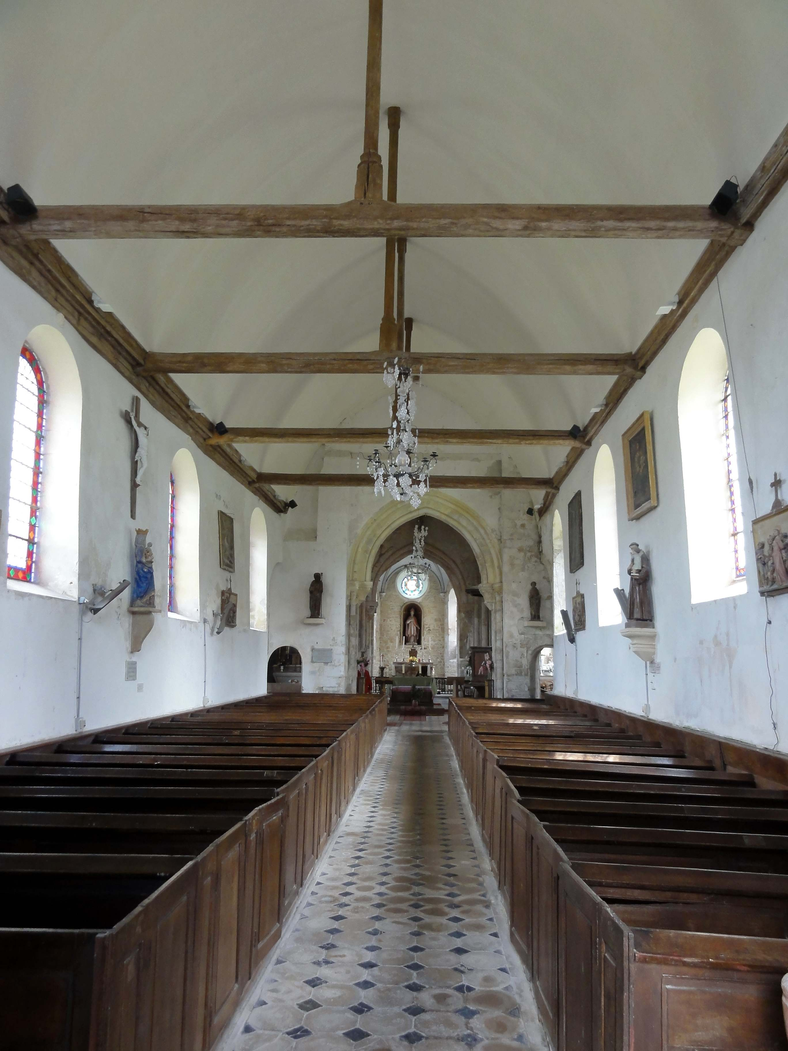 Intérieur de l'église - voir titre.